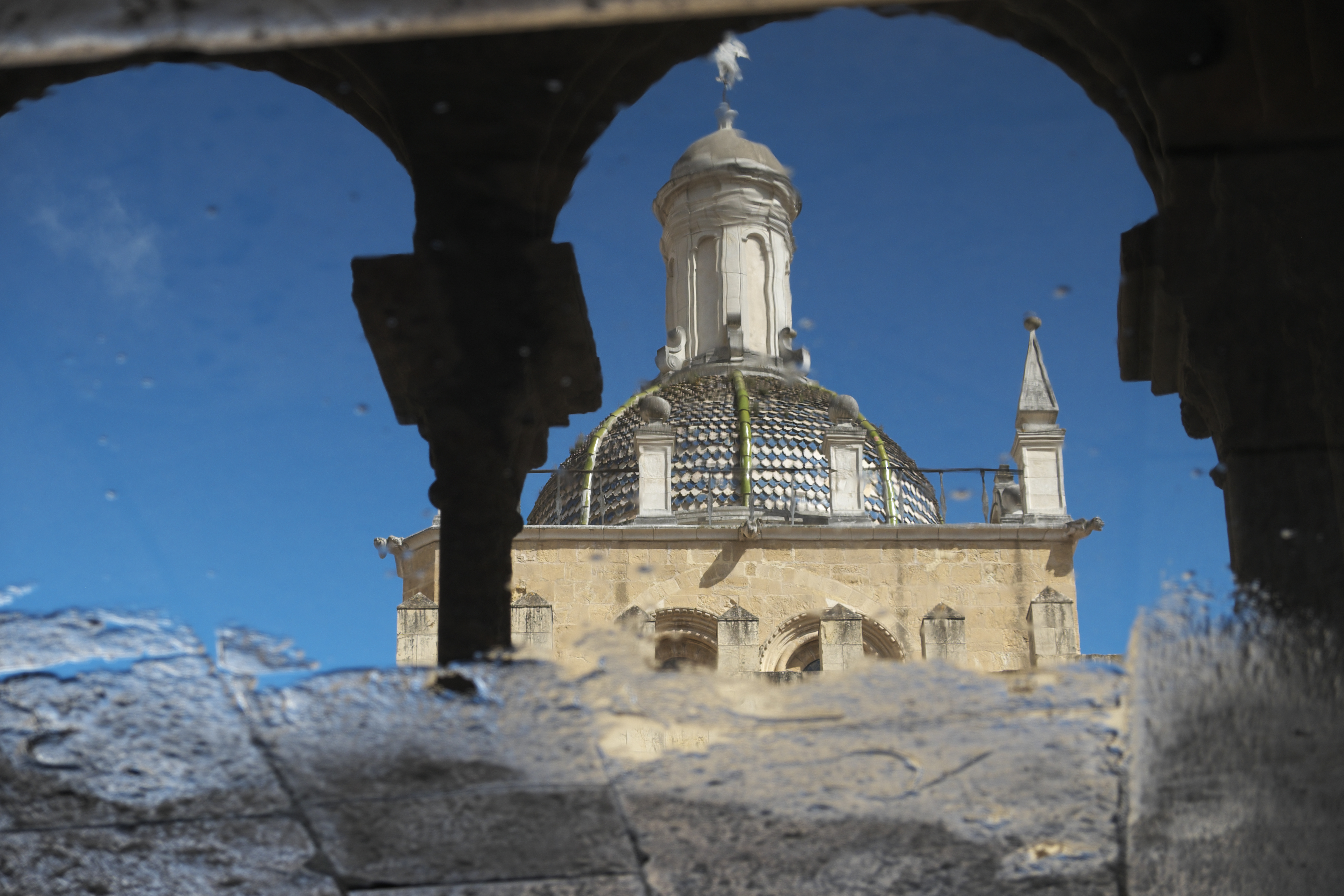 Frühgotischer Kreuzgang der alten Kathedrale Sé Velha in Coimbra in Portugal, aus dem frühen 13. Jahrhundert, Blick auf Sé Velha